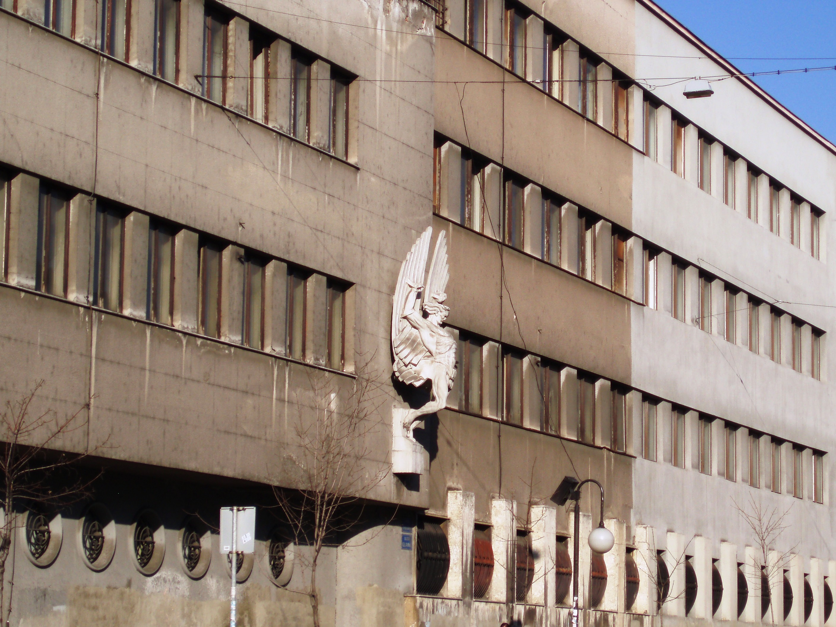 Komanda vazduhoplovstva u Zemunu, autor fotografije: Nicolo